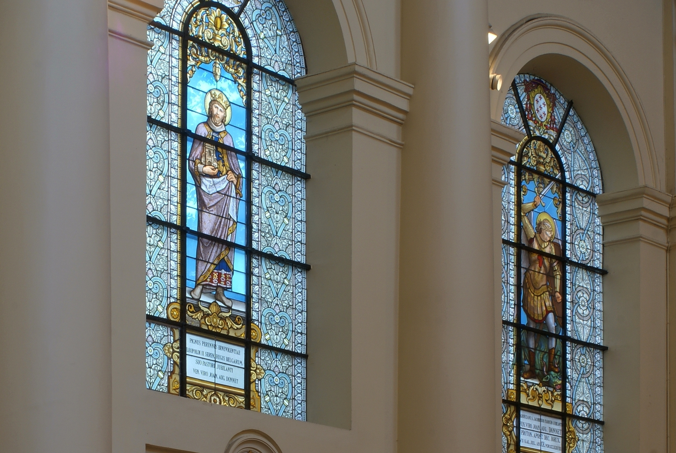 Sint-Jacobskerk-op-Koudenberg - Glasramen